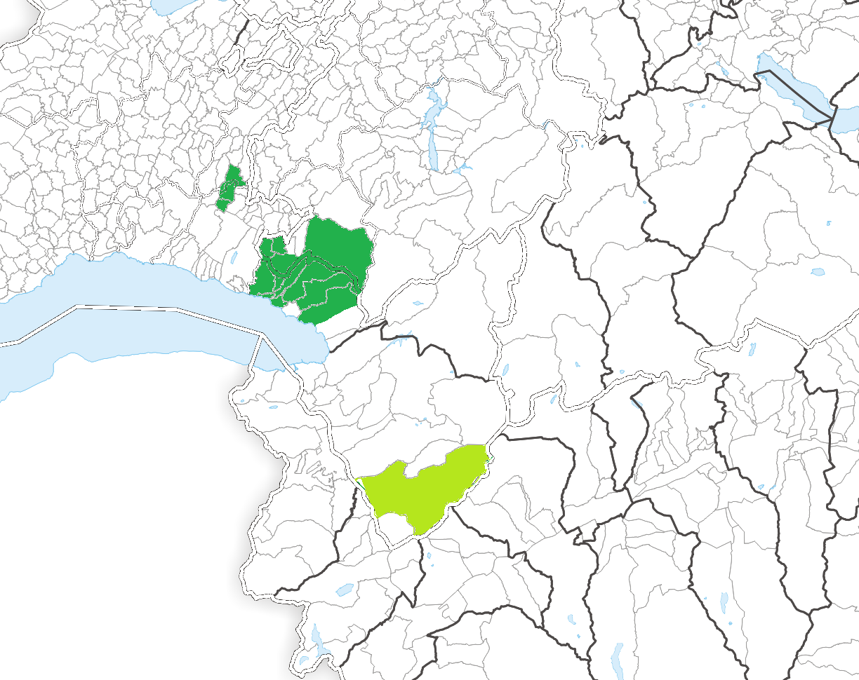 Carte anachronique des possessions de la famille de Blonay en Suisse actuelle (frontières nationales, limites cantonales et communales). Le vert clair indique que les droits seigneuriaux de la famille sont partiels. En vert foncé de haut en bas: les seigneuries de Carrouge et Mézières, Fruence, Attalens et Bossonnens, Corsier, Blonay et Saint-Légier, Vevey, Le Châtelard; en vert clair: seigneurie de Bex